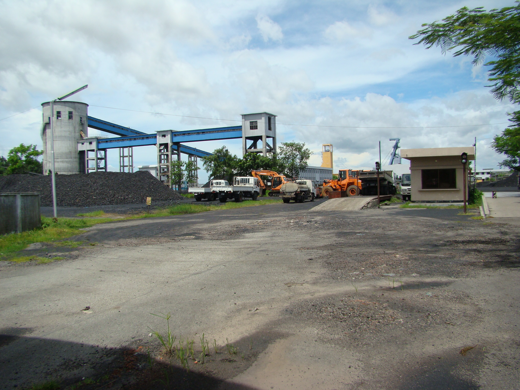 Barapukuria Coal Mine Dinajpur Bangladesh